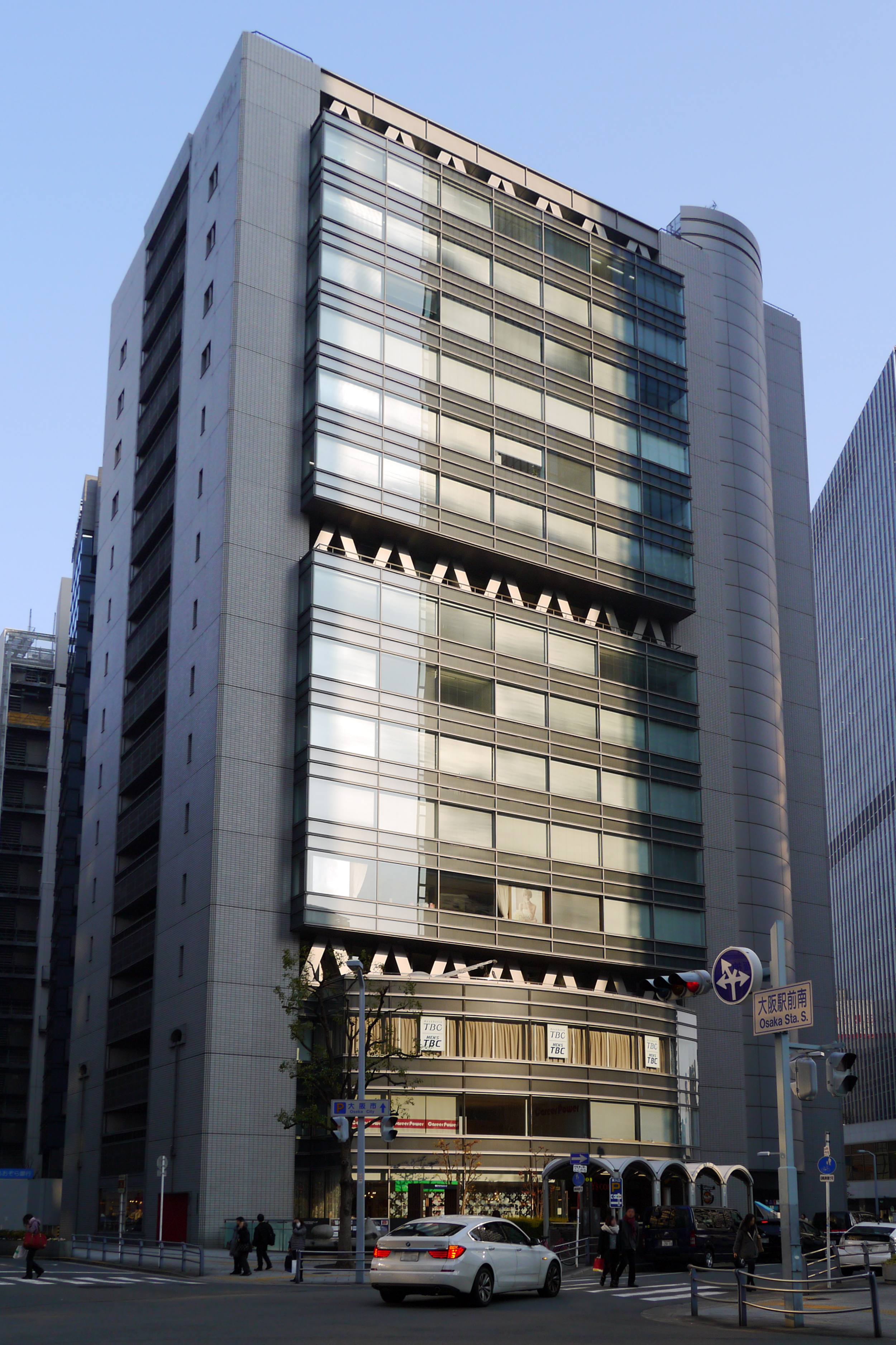 Umeda Square Bldg (梅田スクエアビル), Osaka, Osaka prefecture, Japan